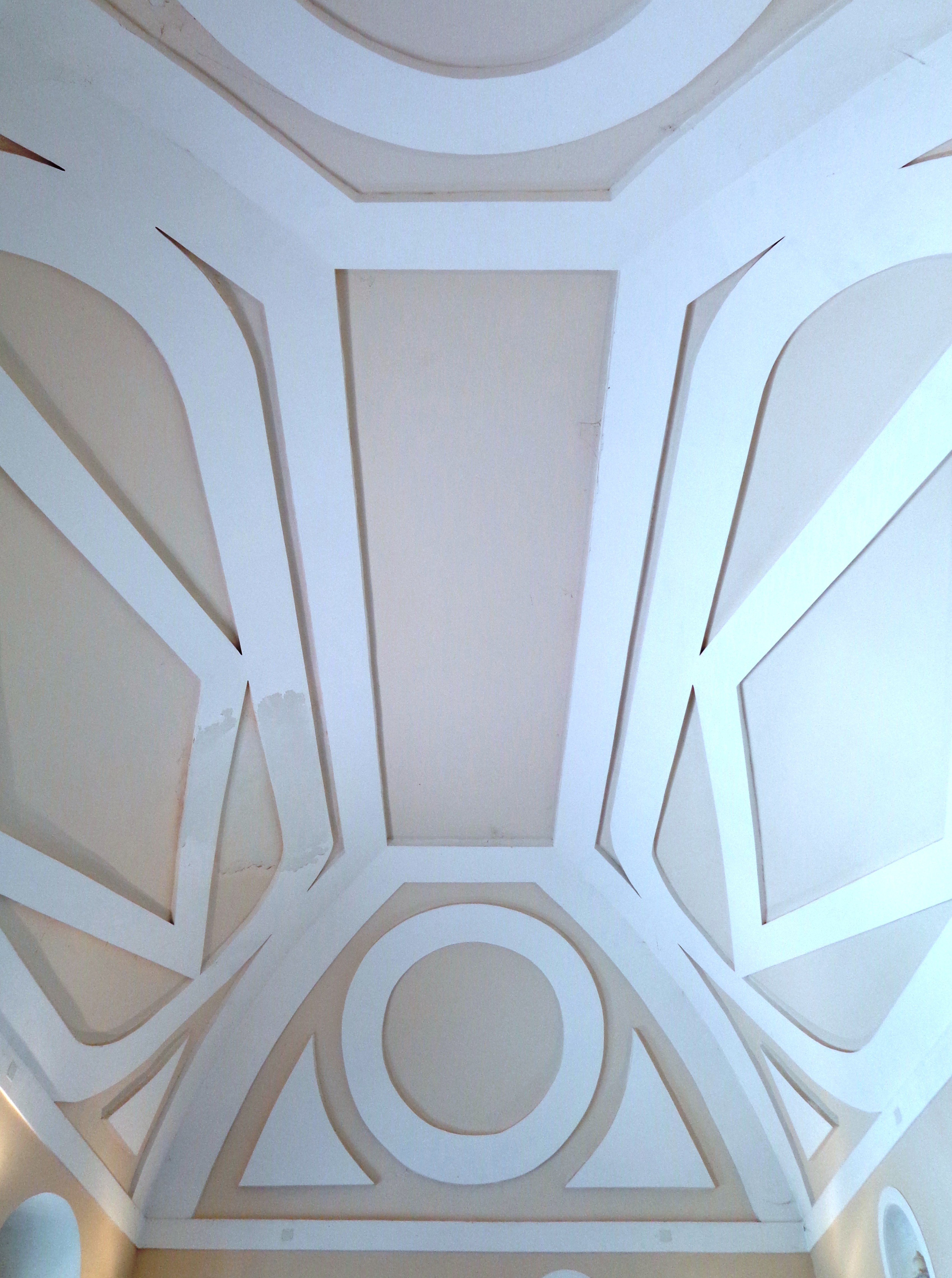 Castello di Bauso This is a photo of a monument which is part of cultural heritage of Italy.